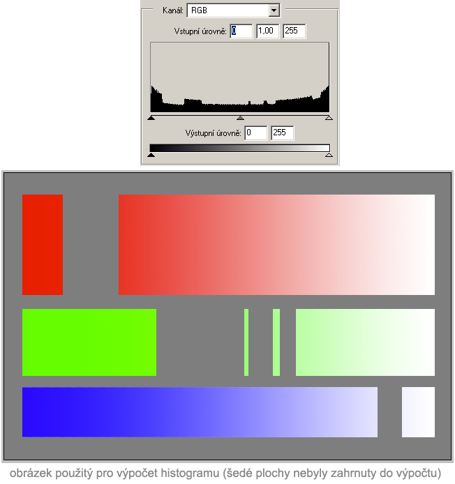 Histogram